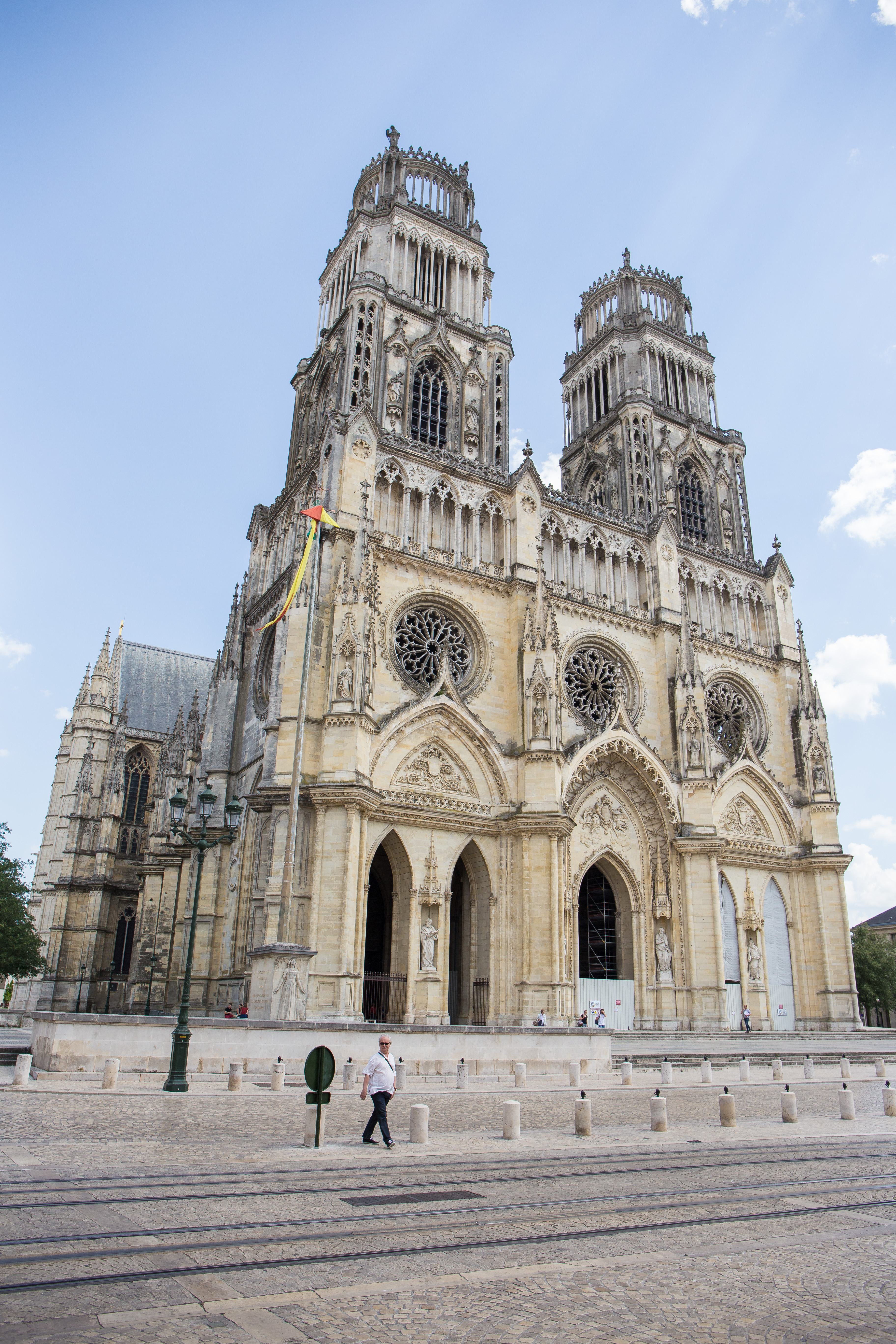 Façade de la Cathédrale Sainte-Croix d'Orléans